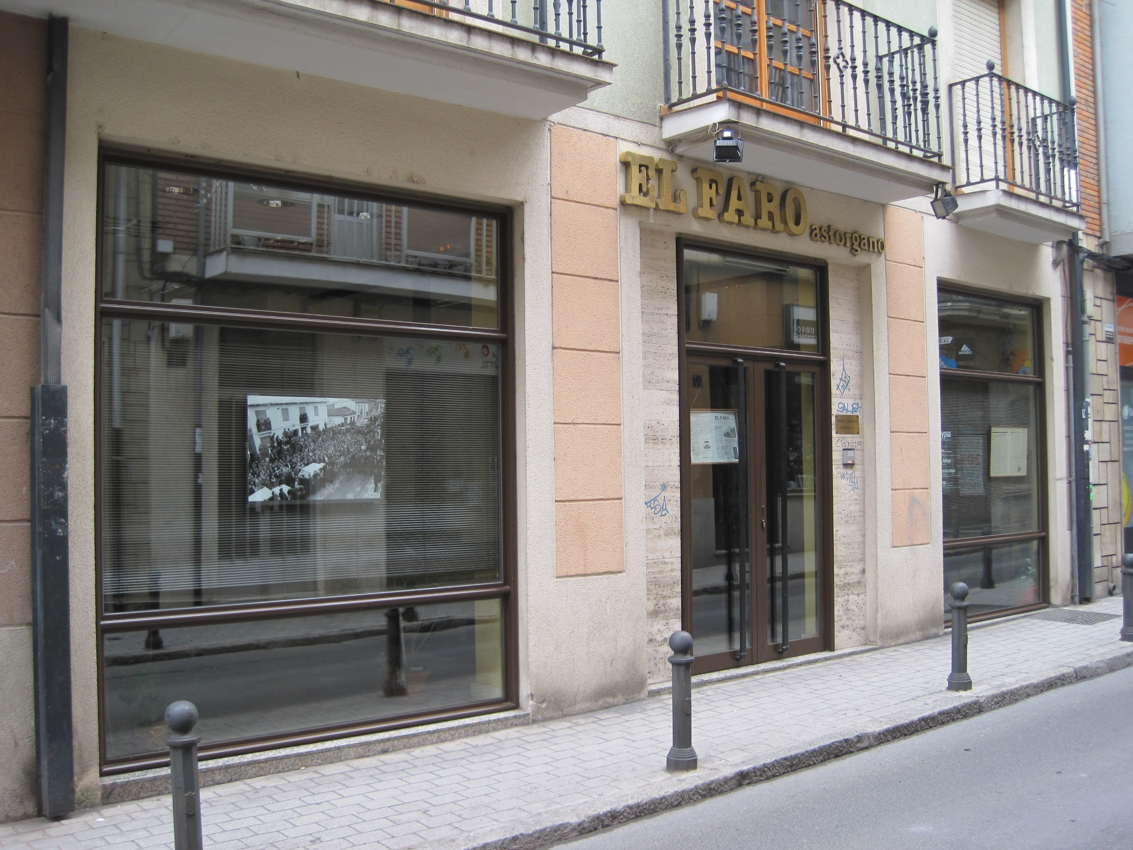 Sede del periódico El Faro Astorgano, en Astorga (León, España).